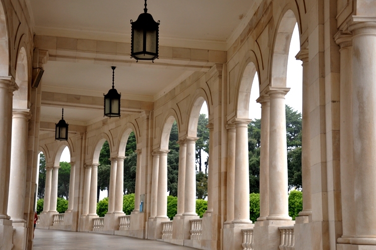 Fatima - Portugal